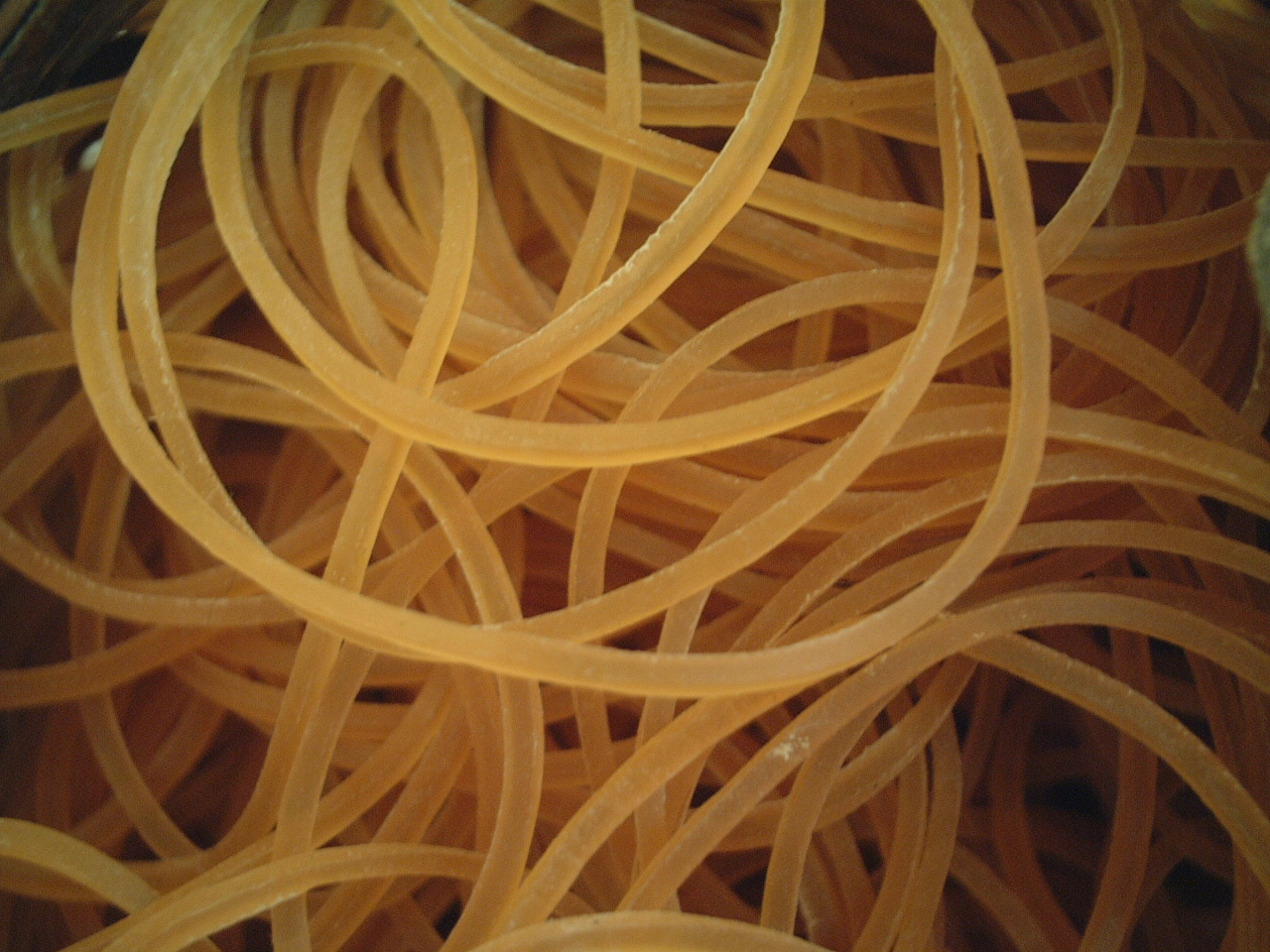 rubberband